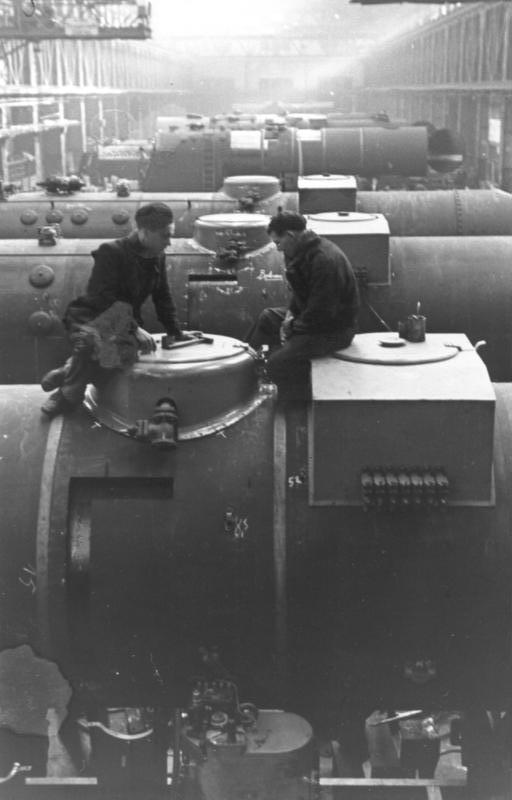 Neben vielen deutschen sind auch Tausende von ausländischen Arbeitern mit der Fertigstellung der Kriegslokomotiven beschäftigt. Hier sind Franzosen als Monteure tätig.